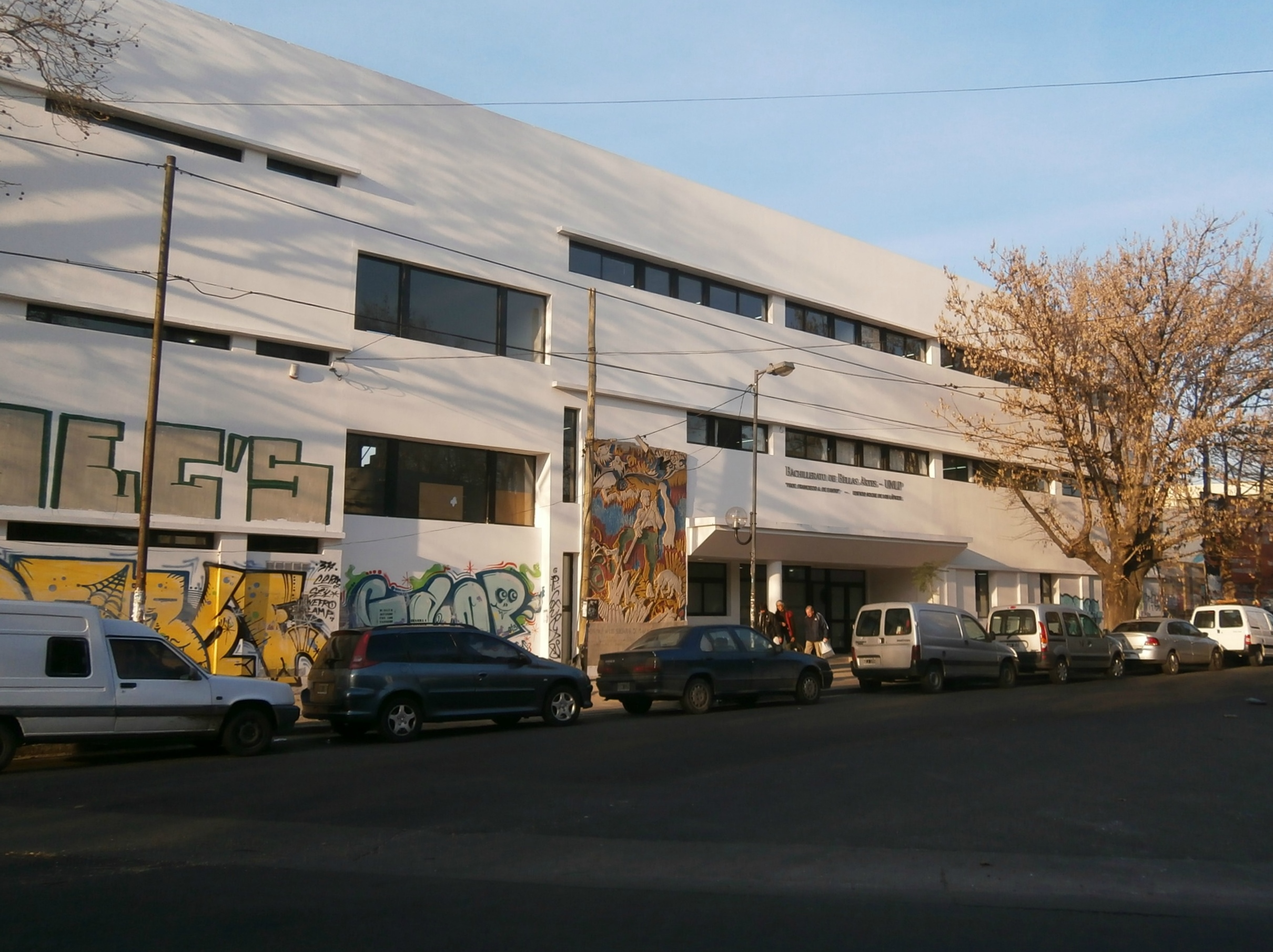 Fachada del edificio “Noche de los lápices”, nueva sede del Bachillerato de Bellas Artes "Prof. Francisco A. De Santo", perteneciente a la Universidad Nacional de La Plata, en Argentina.